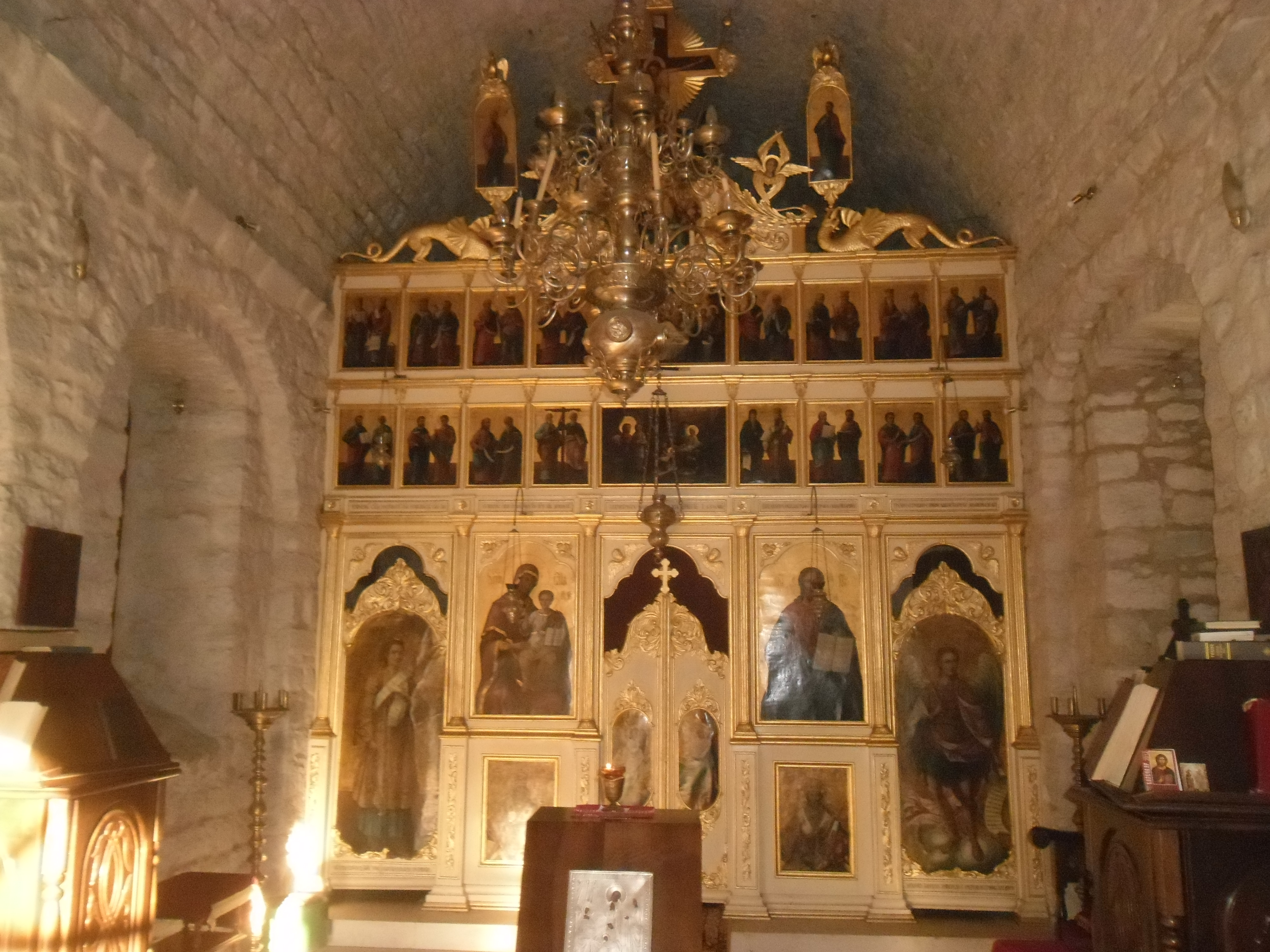 Cetinje